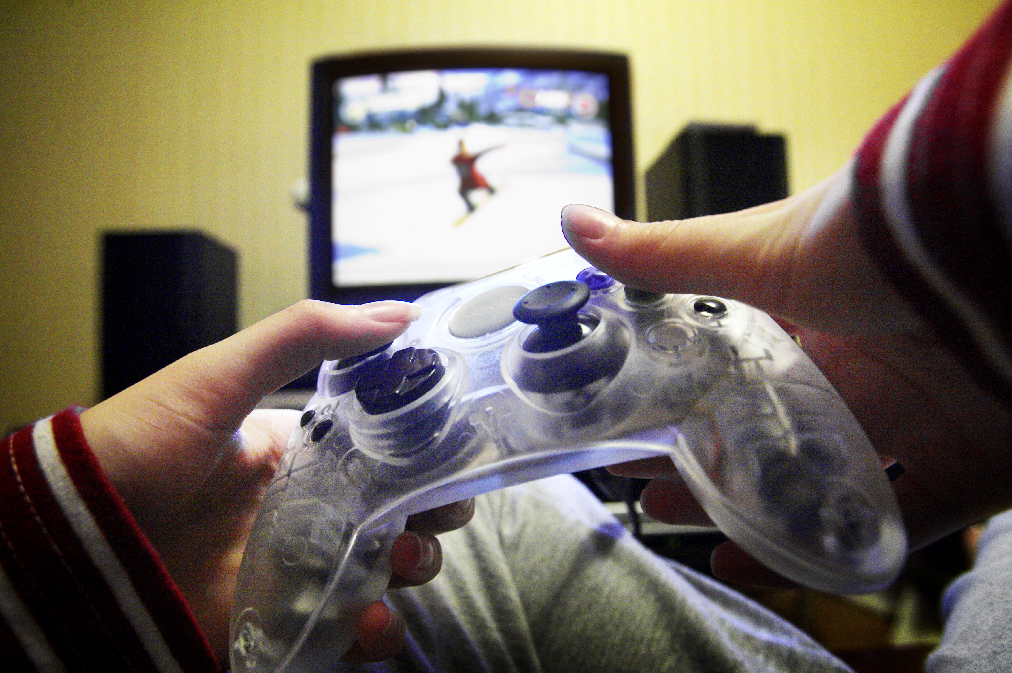 Dataspel